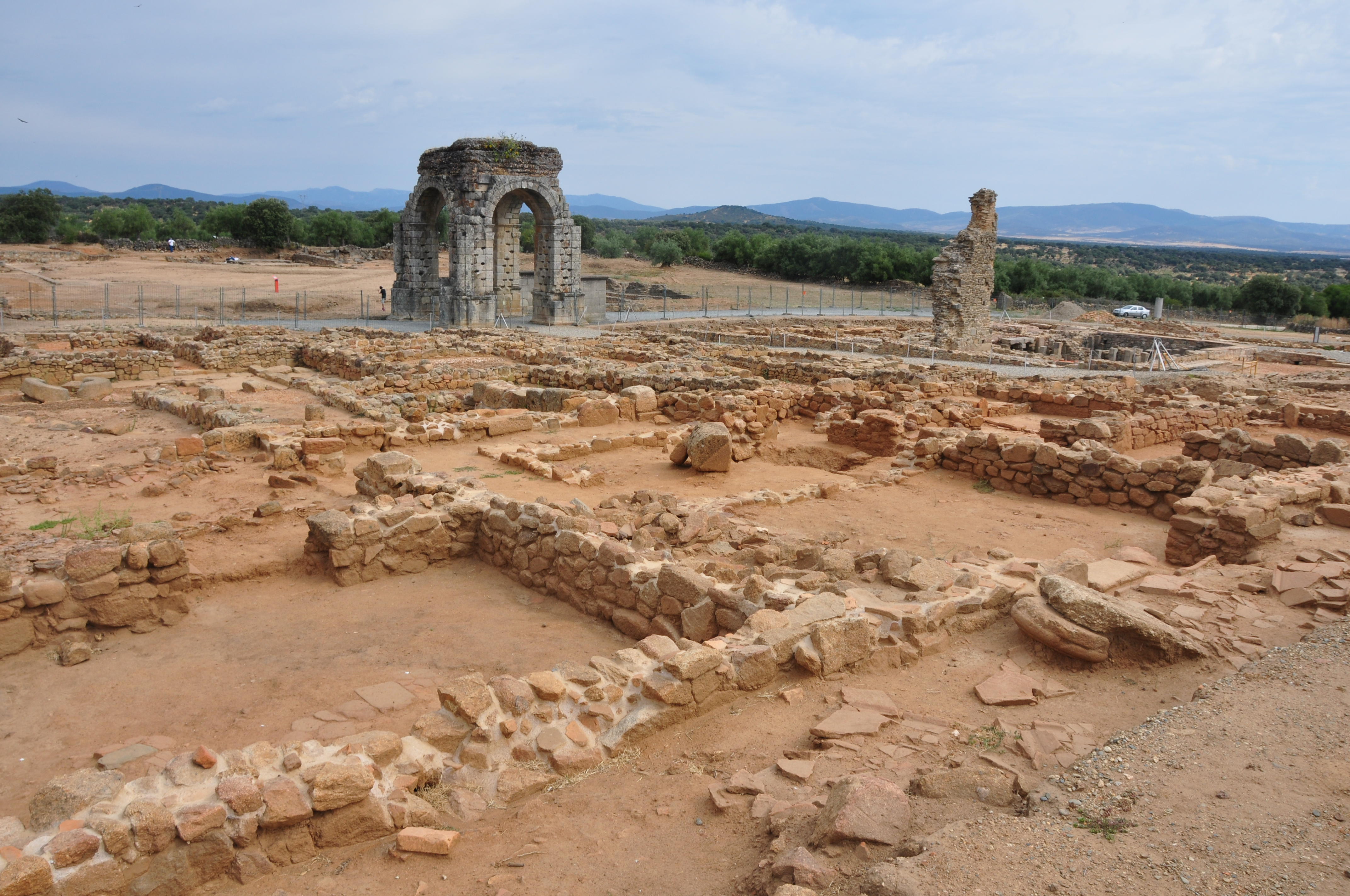 Ciudad romana de Cáparra, zona comercial junto a las Termas.